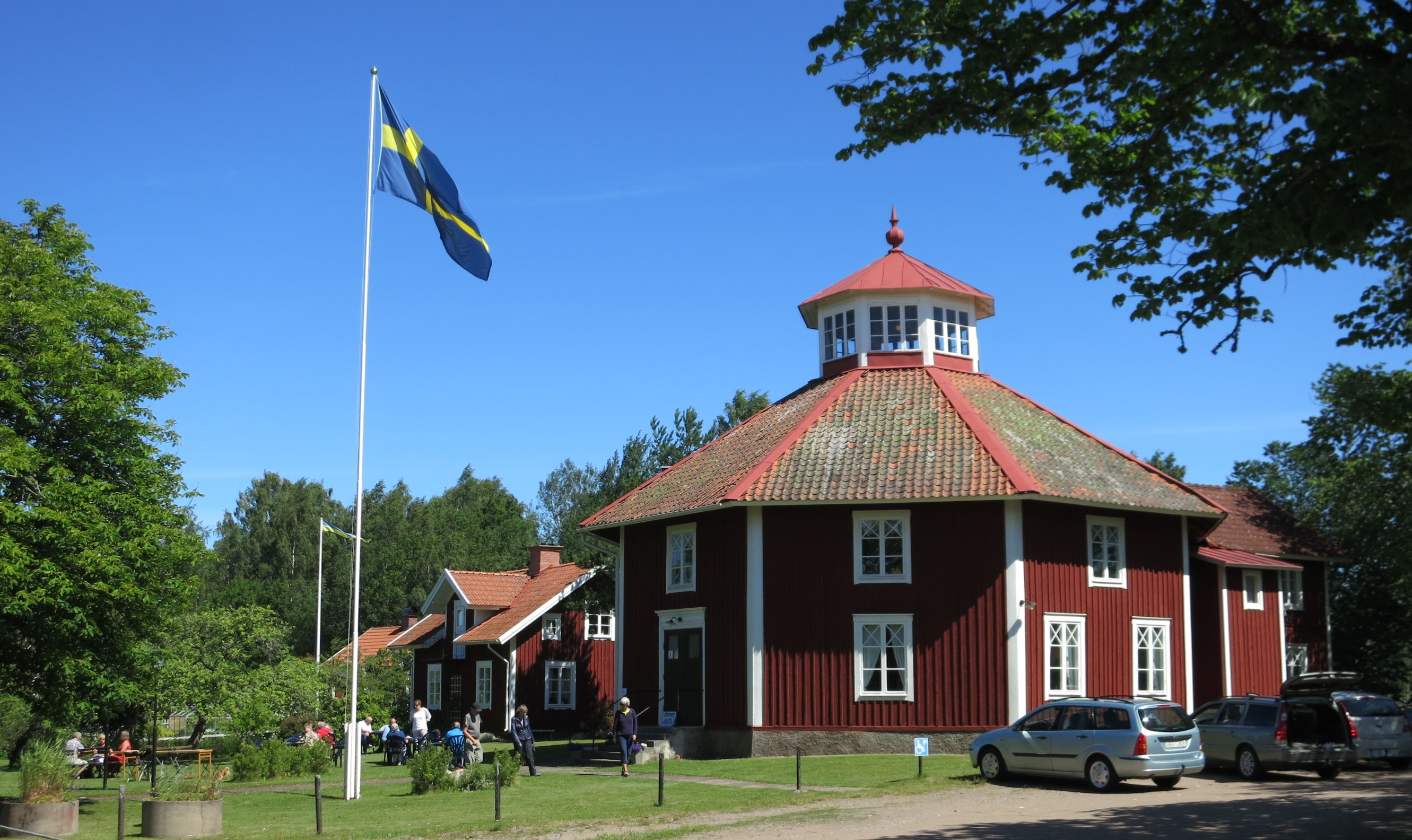 Bygdegården, gamla missionshuset. Invigd 1880.